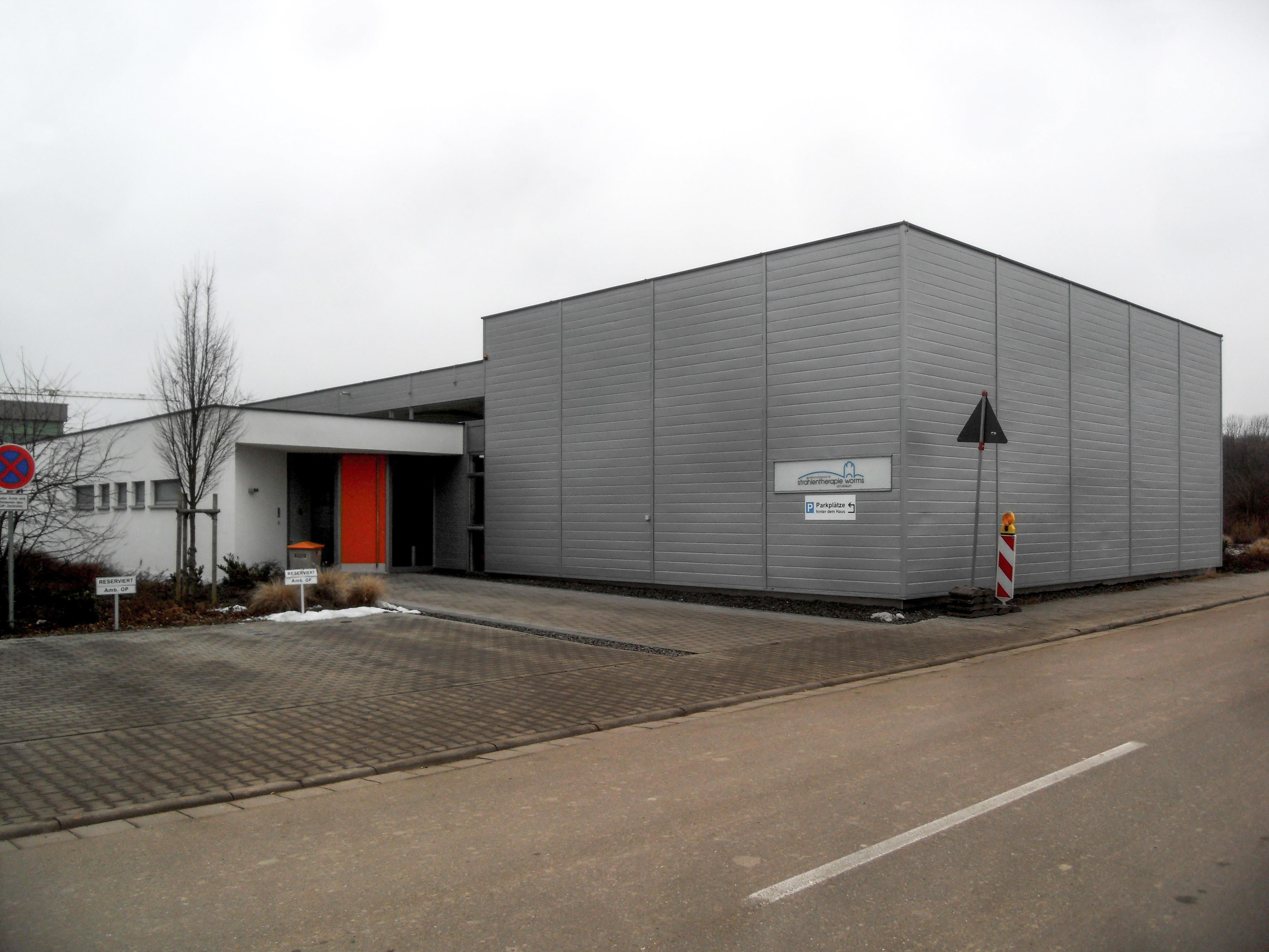 Die Praxis für Strahlentherapie des Klinikums Worms in Rheinhessen in Rheinland-Pfalz (Deutschland)